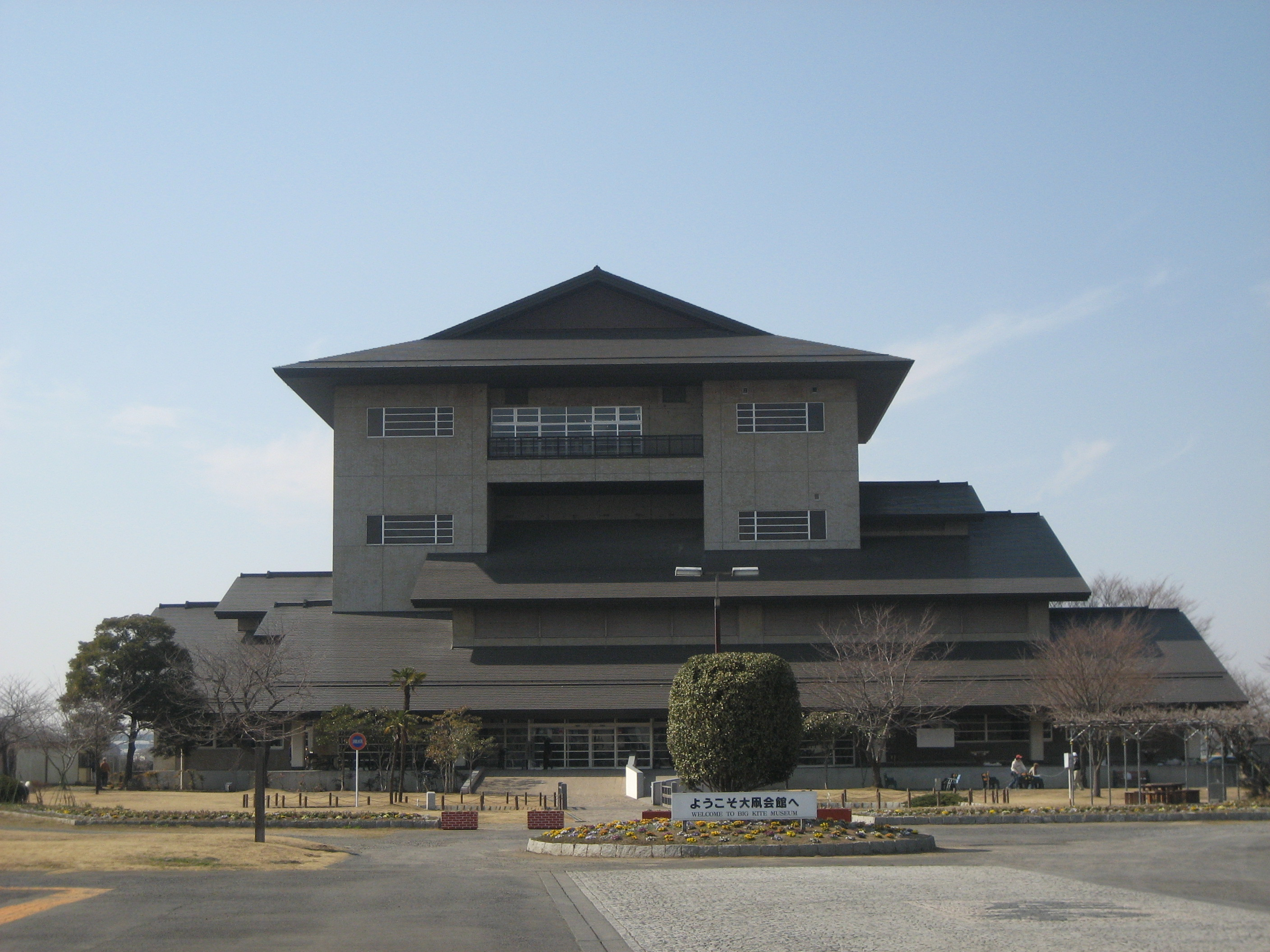 春日部市庄和大凧会館